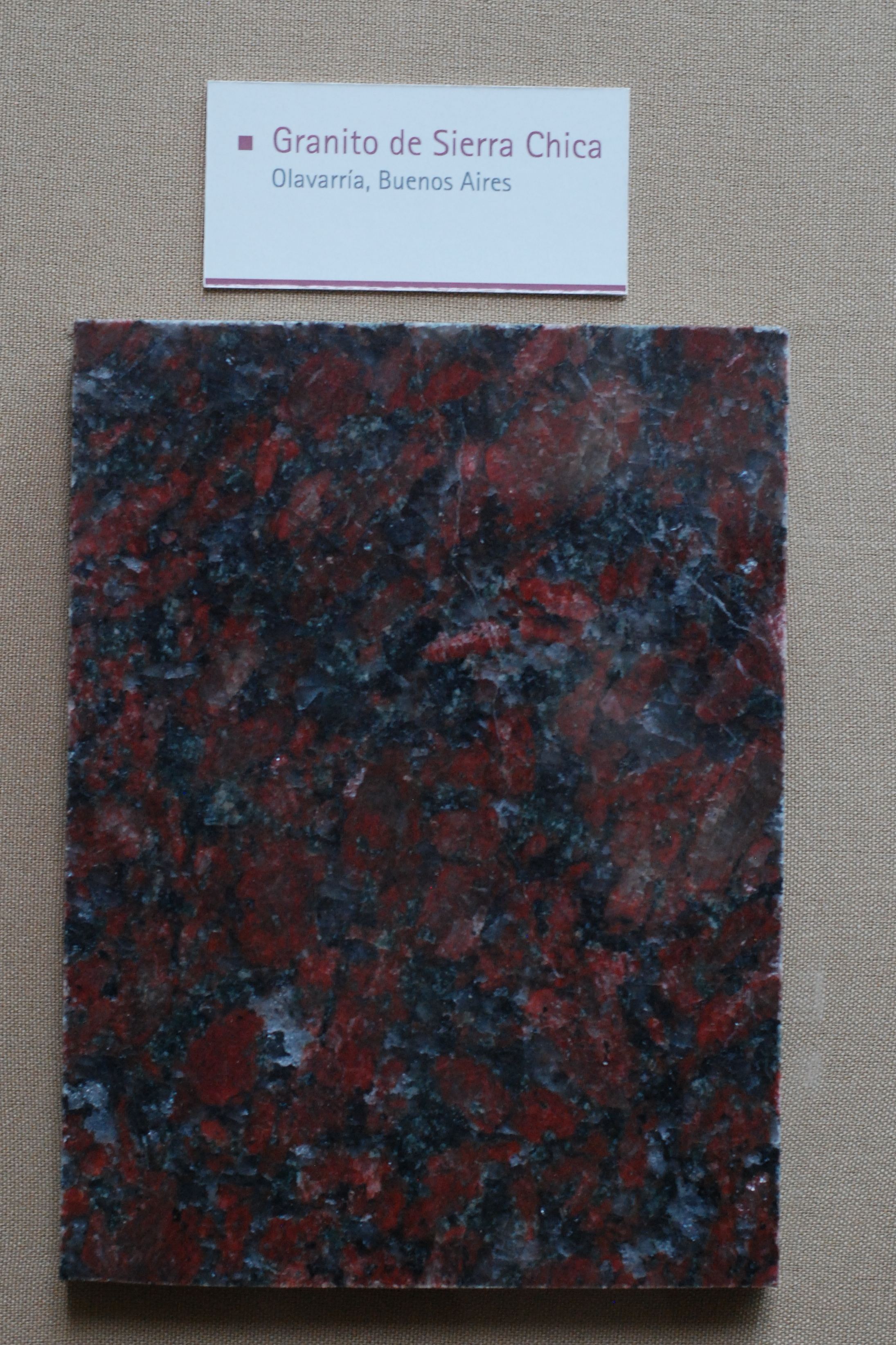 Granito de Sierra Chica. Olavarria, Buenos Aires.